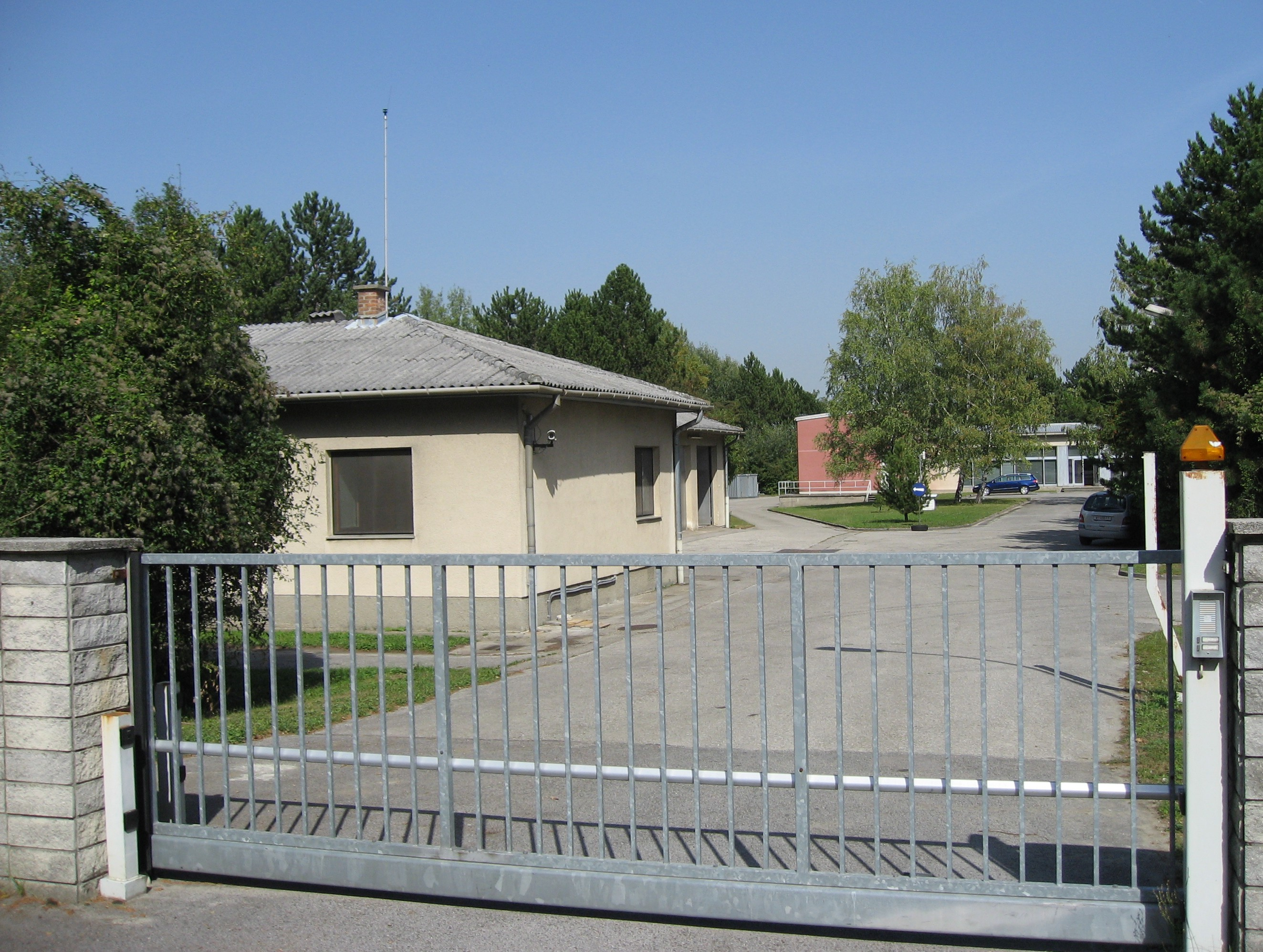 Grundwasserwerk Lobau in Wien Donaustadt